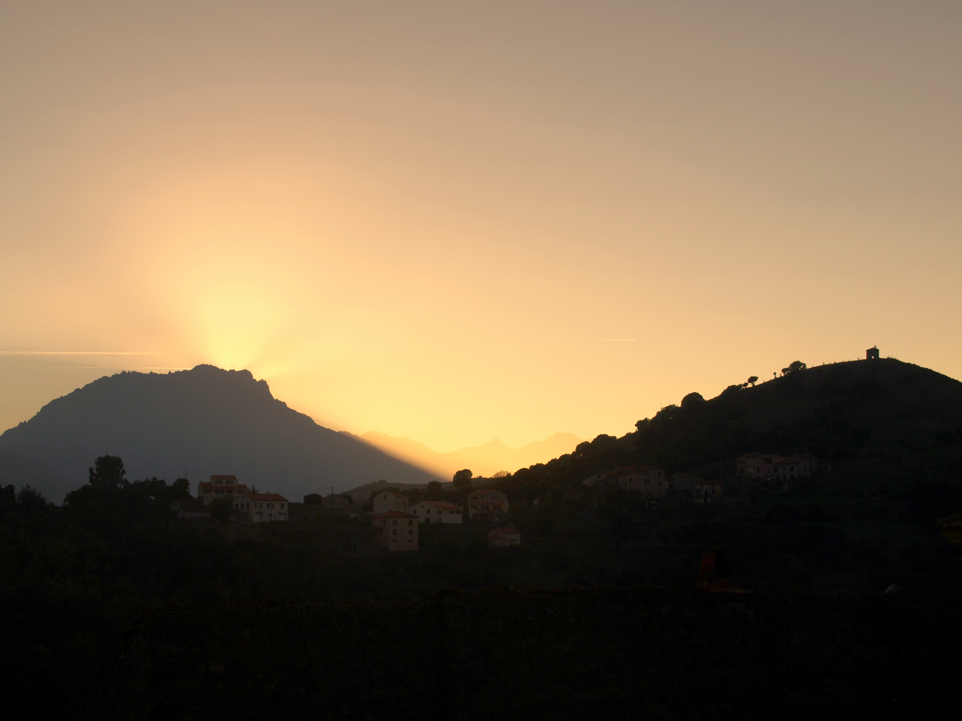 Pietralba (Corsica) - Coucher de soleil sur Pedano. A droite la chapelle Saint-Michel ruinée